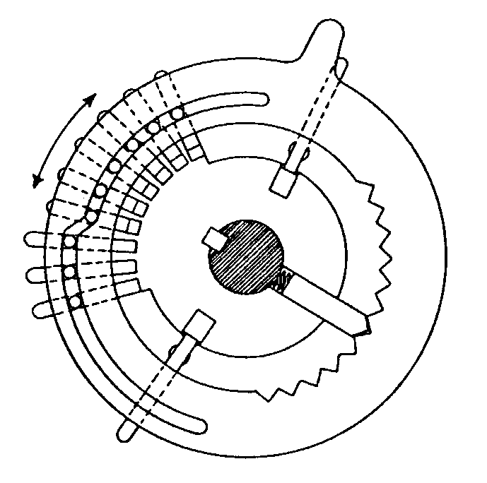 Scan aus Wassén, Henry: The Odhner History ? An Illustrated Chronicle of "A Machine to Count on", Gothenburg: Wezäta, 1951